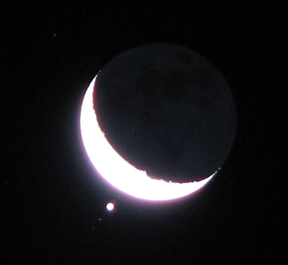 הירח עומד להסתיר את צדק וירחיו